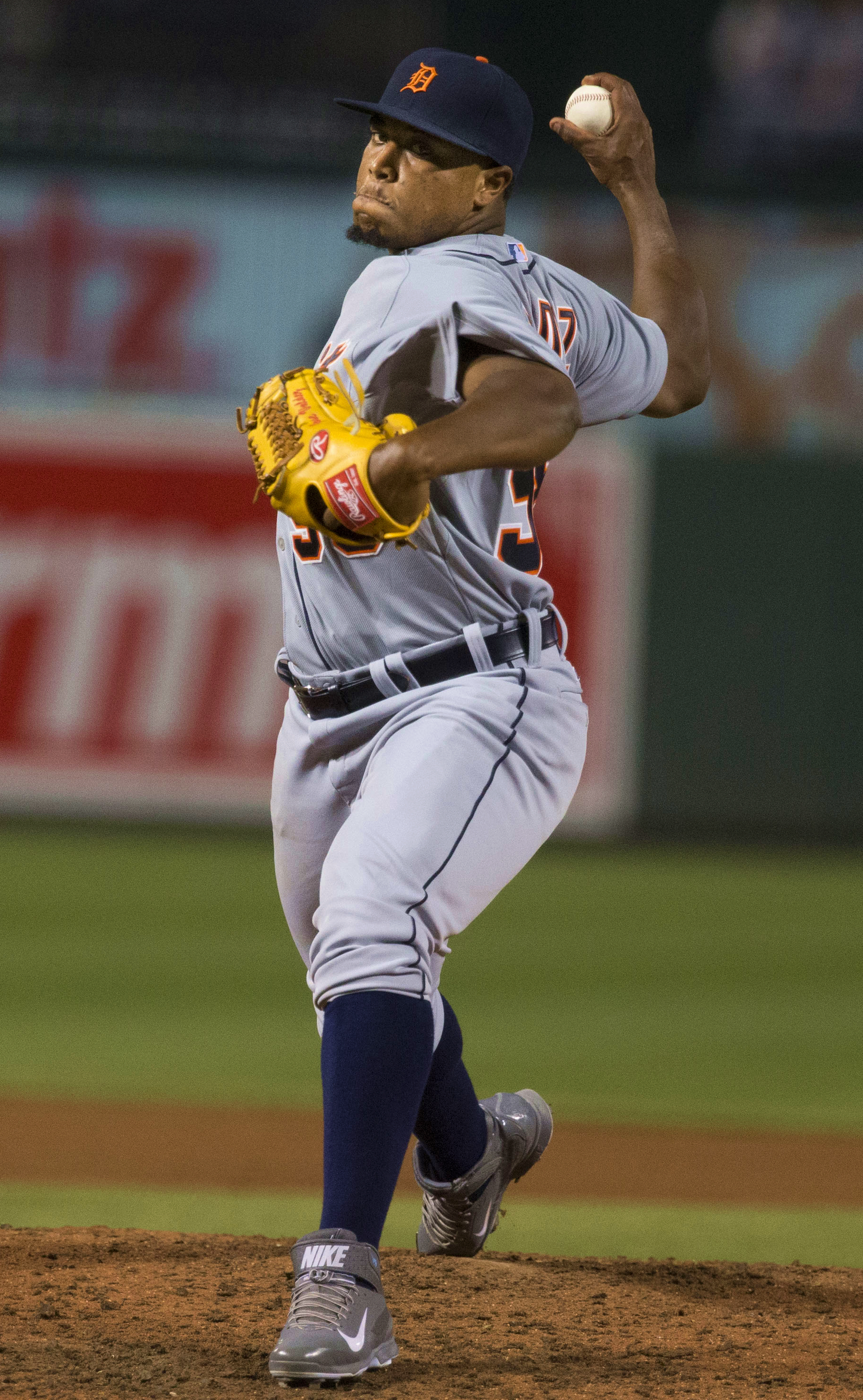 José Valdez